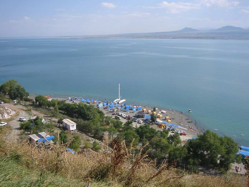 Lake Sevan